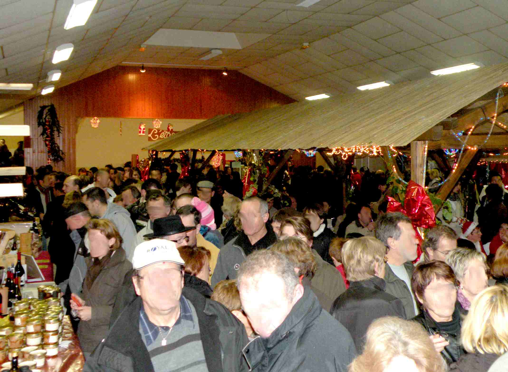 Photographie prise lors du marche de noel de baugy